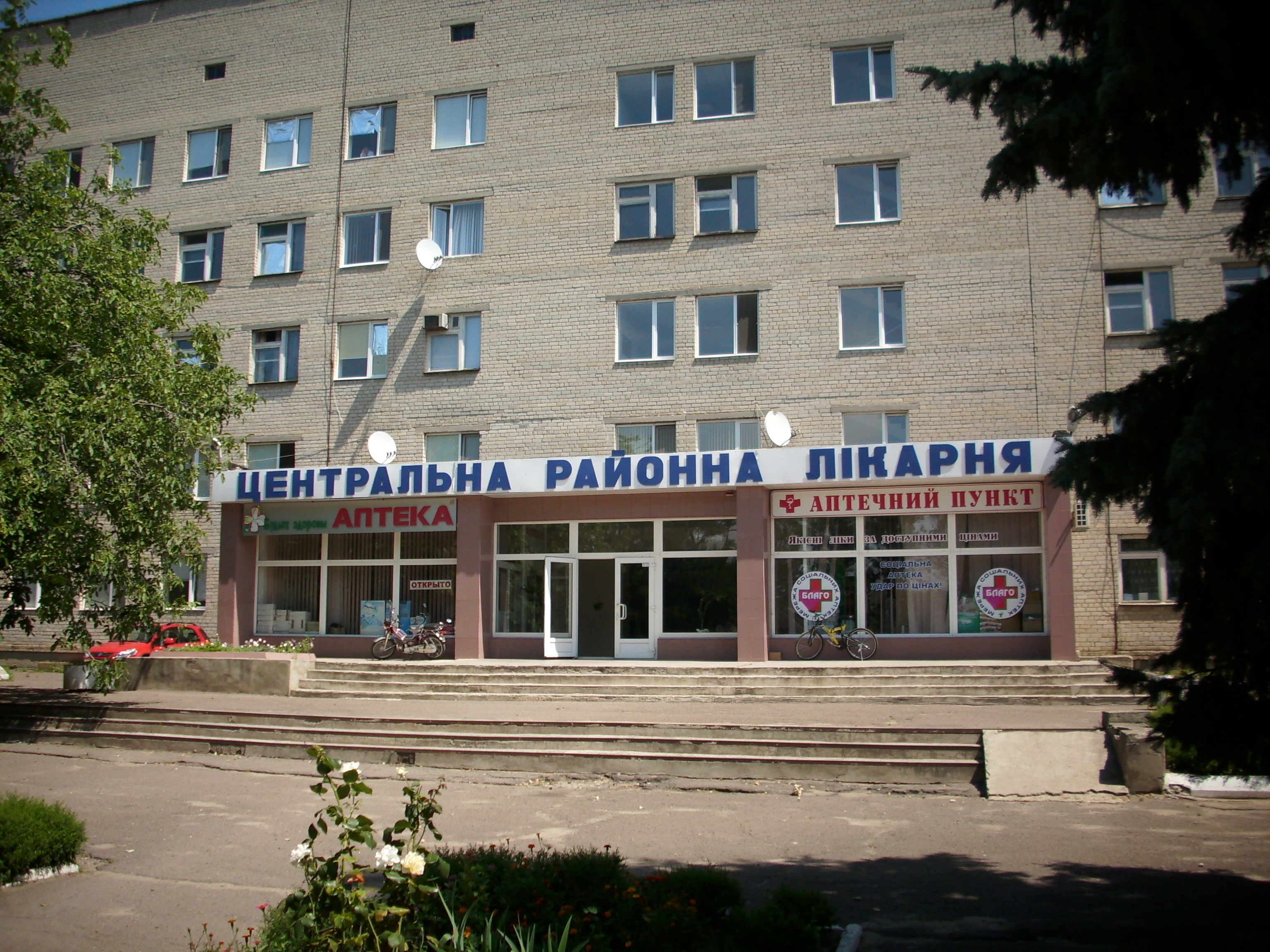 Центральная районная больница в Раздельной